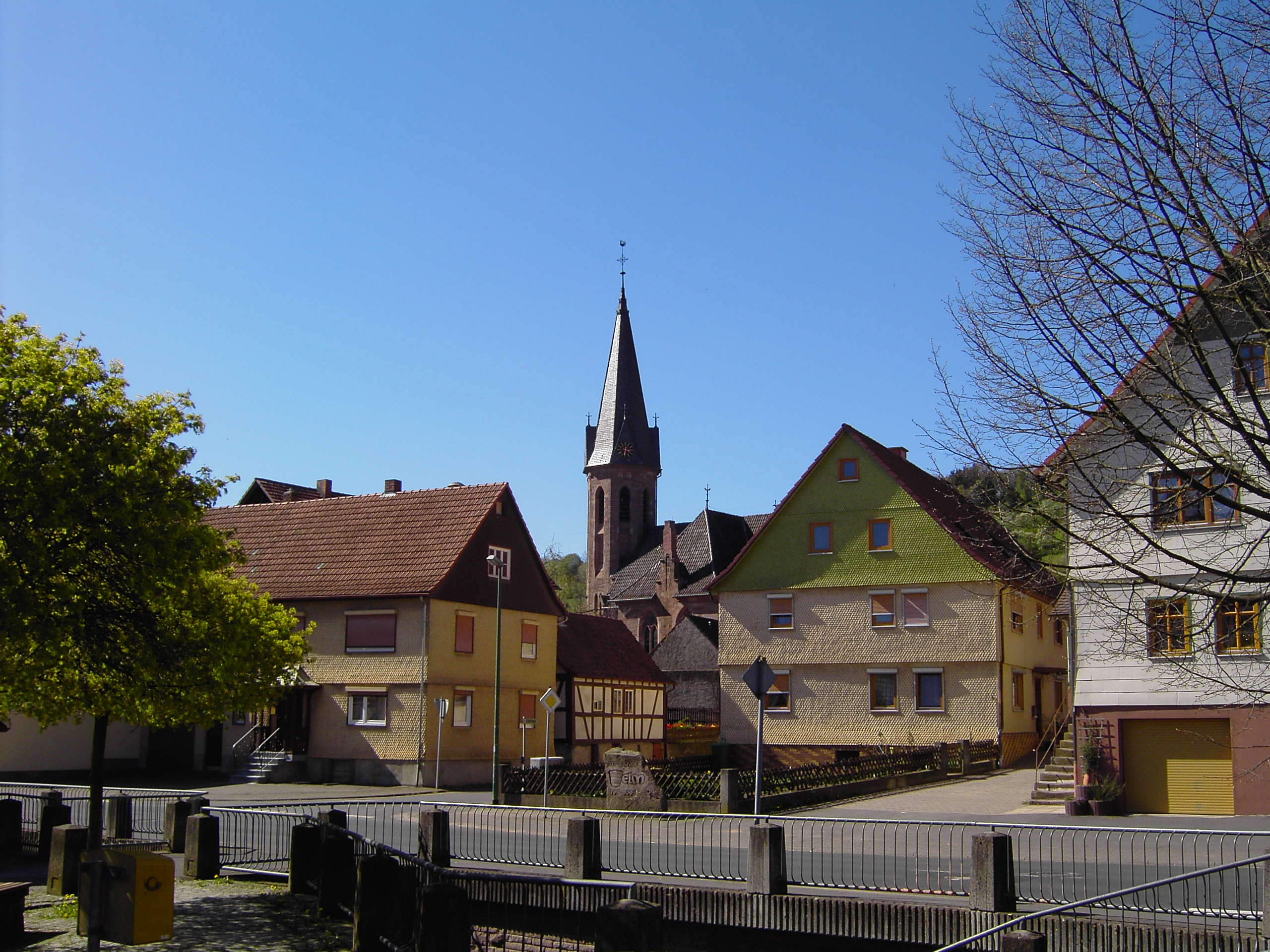 Elms Dorfmitte mit Blick auf die Evangelische Kirche